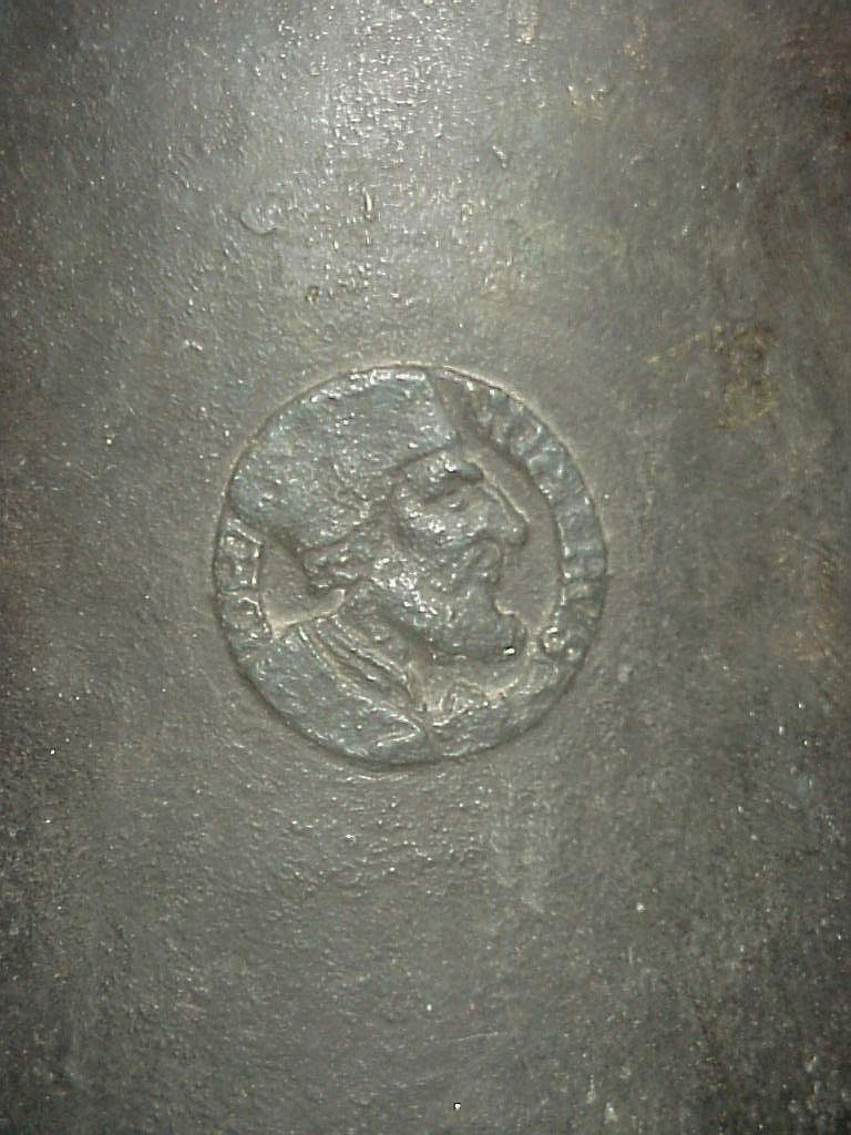 bell in Ústí nad Labem